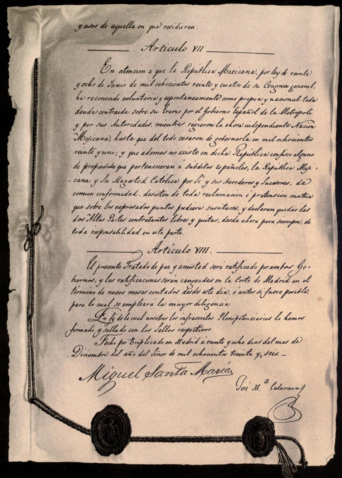 Fácsimile de la última página del Tratado de Paz y Amistad entre México y España firmado el 28 de diciembre de 1836